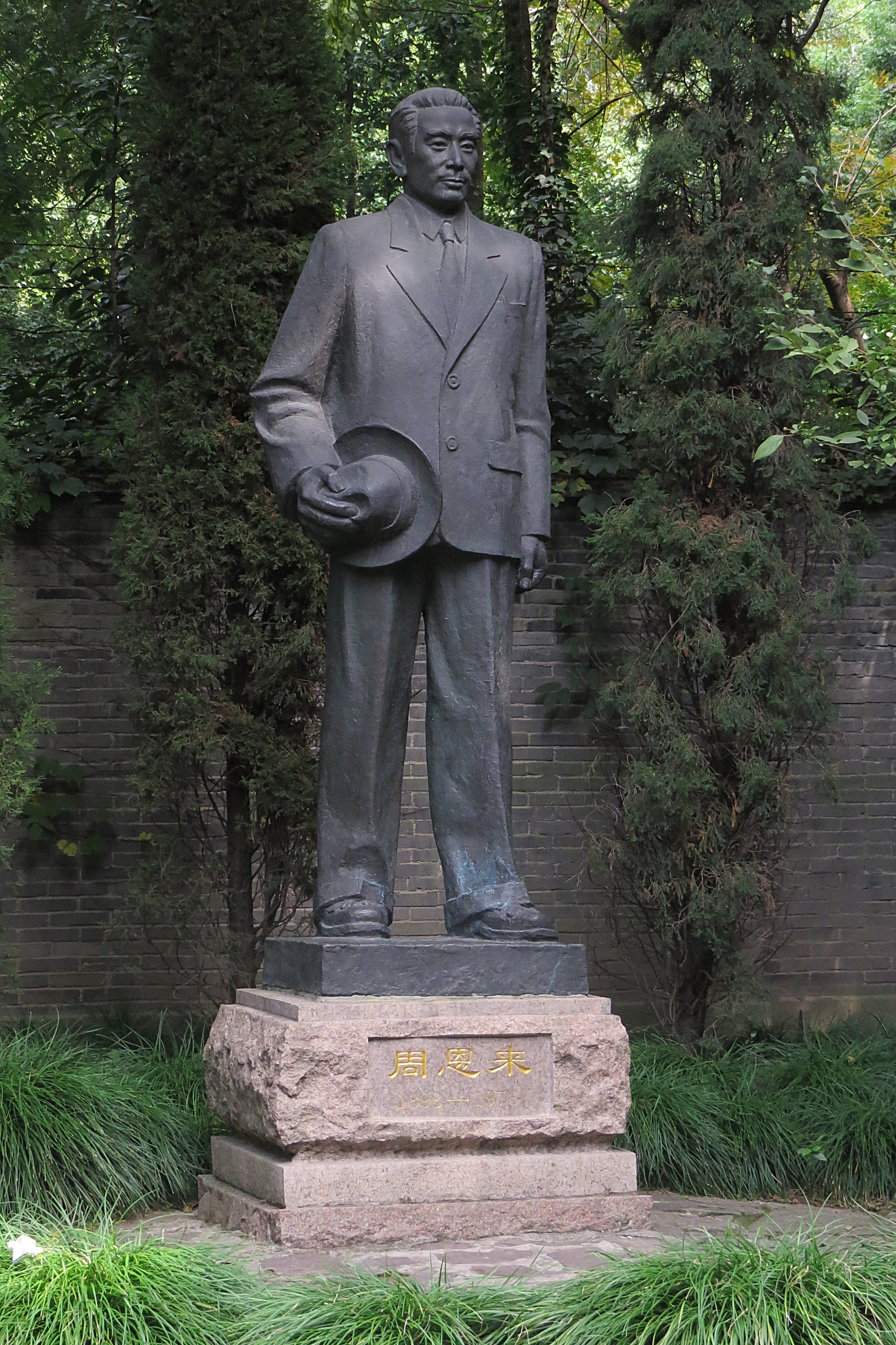 上海周公馆花园内的周恩来铜像